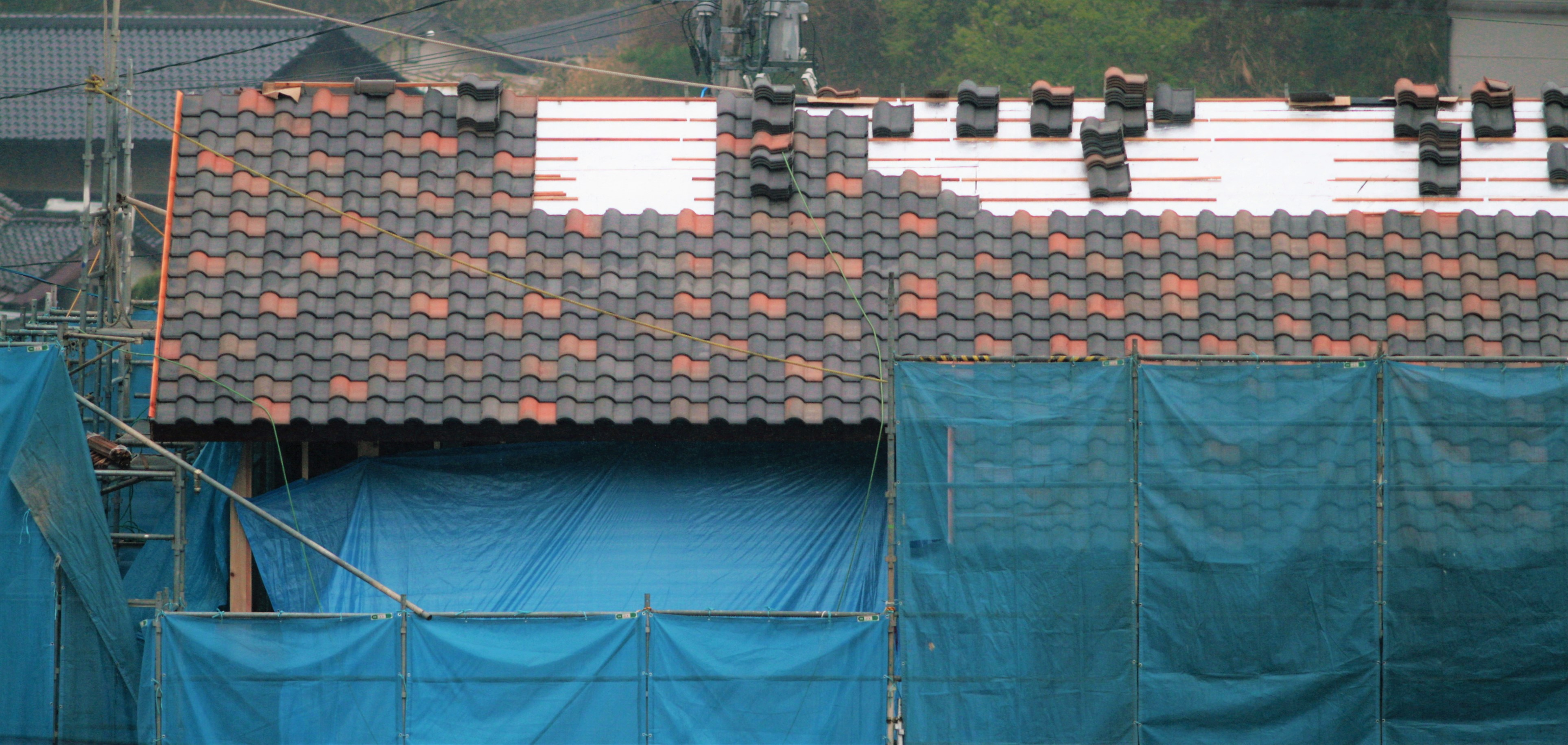 窯変瓦の施工風景。一枚ずつ色調が大きく異なるために、屋根全体の配色を考えて設置する必要がある。淡路瓦の近畿セラミック社の同じ形状のS瓦を使用しているが、色調は窯変ダークが70％、窯変ミディアムが30％と、2種類の窯変瓦を混ぜ葺きしています。銀色の下地は、遮熱ルーフィングシート。